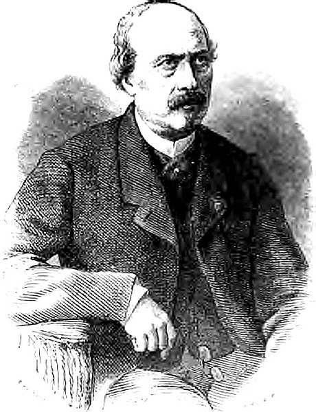 François_Ponsard_(vers_1866)